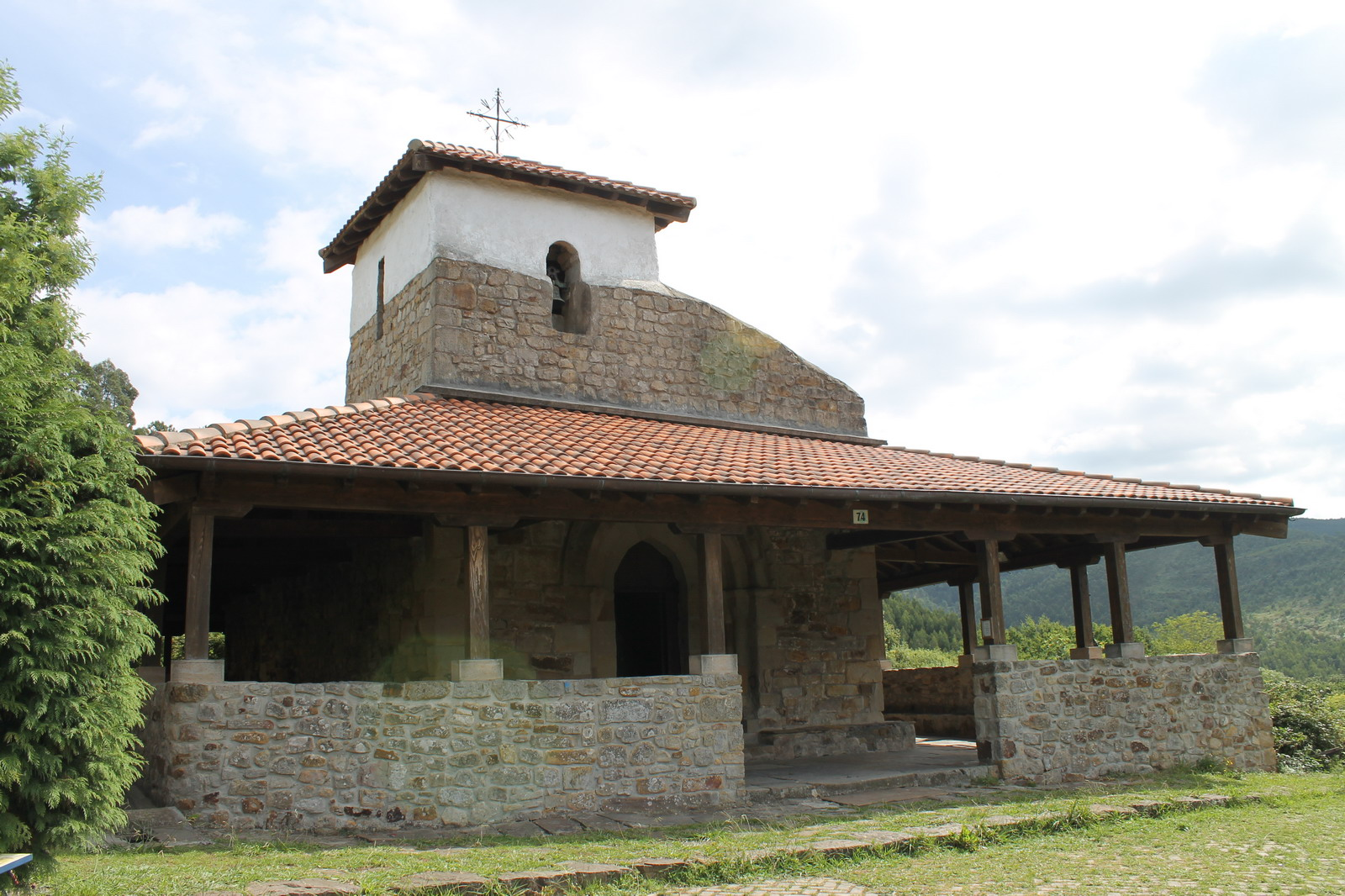 Ermita de San Pelaio (Bakio)